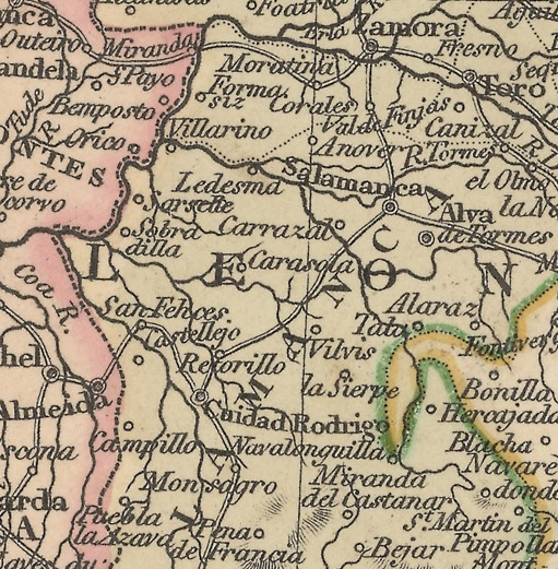 Detalle del mapa Spain and Portugal de B. Smith. Publicado en 1824 en Londres por C. Smith.